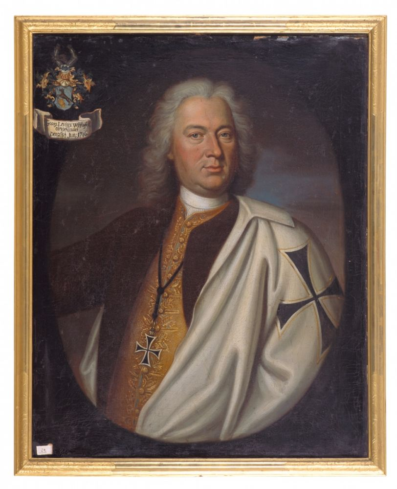 Georg Levin von Winterfeldt (1674 - 1728) - Öl/Lwd. 85 x 68 cm.